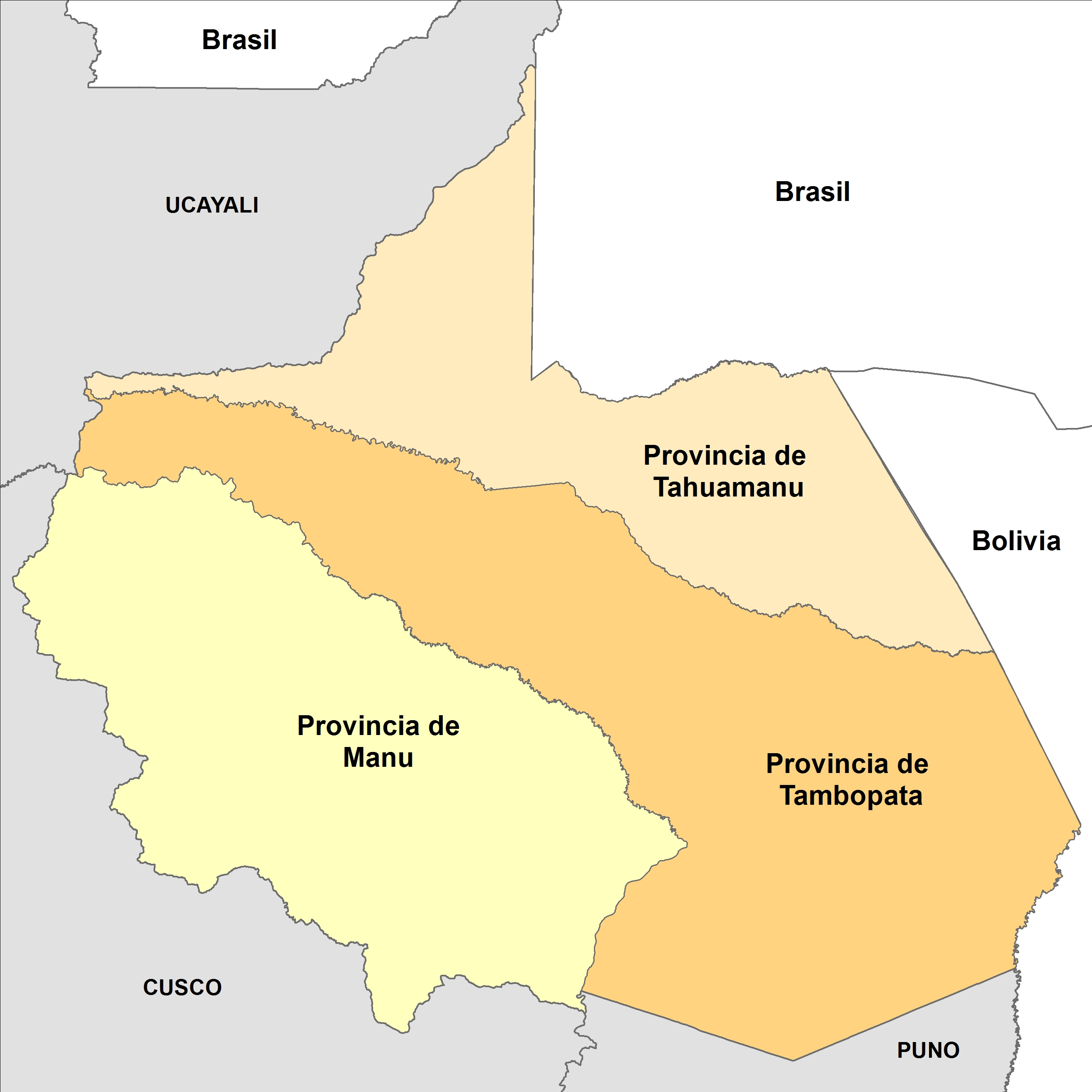 Mapa de las provincias del Departamento de Madre de Dios